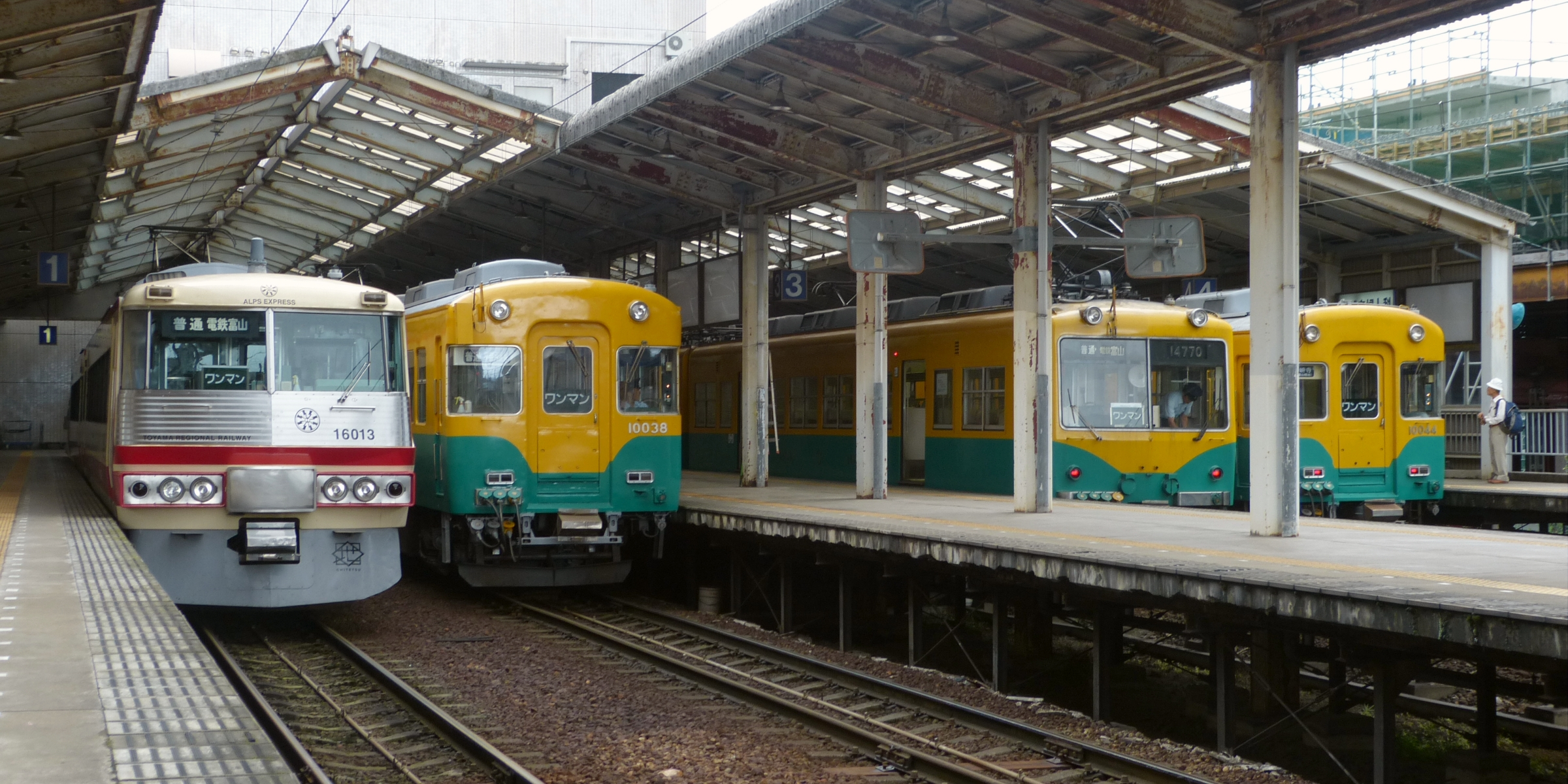 富山地方鉄道電鉄富山駅。左から16013、10038、14770、10044。